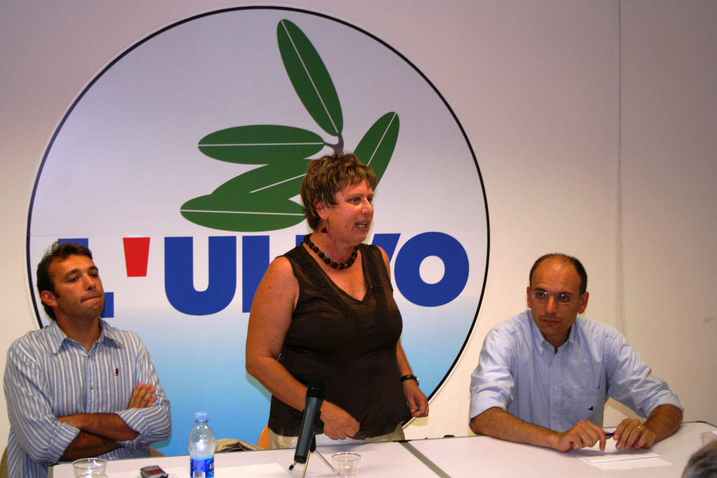 Enrico Letta e Matteo Richetti durante l'incontro a Modena del 26 agosto 2007